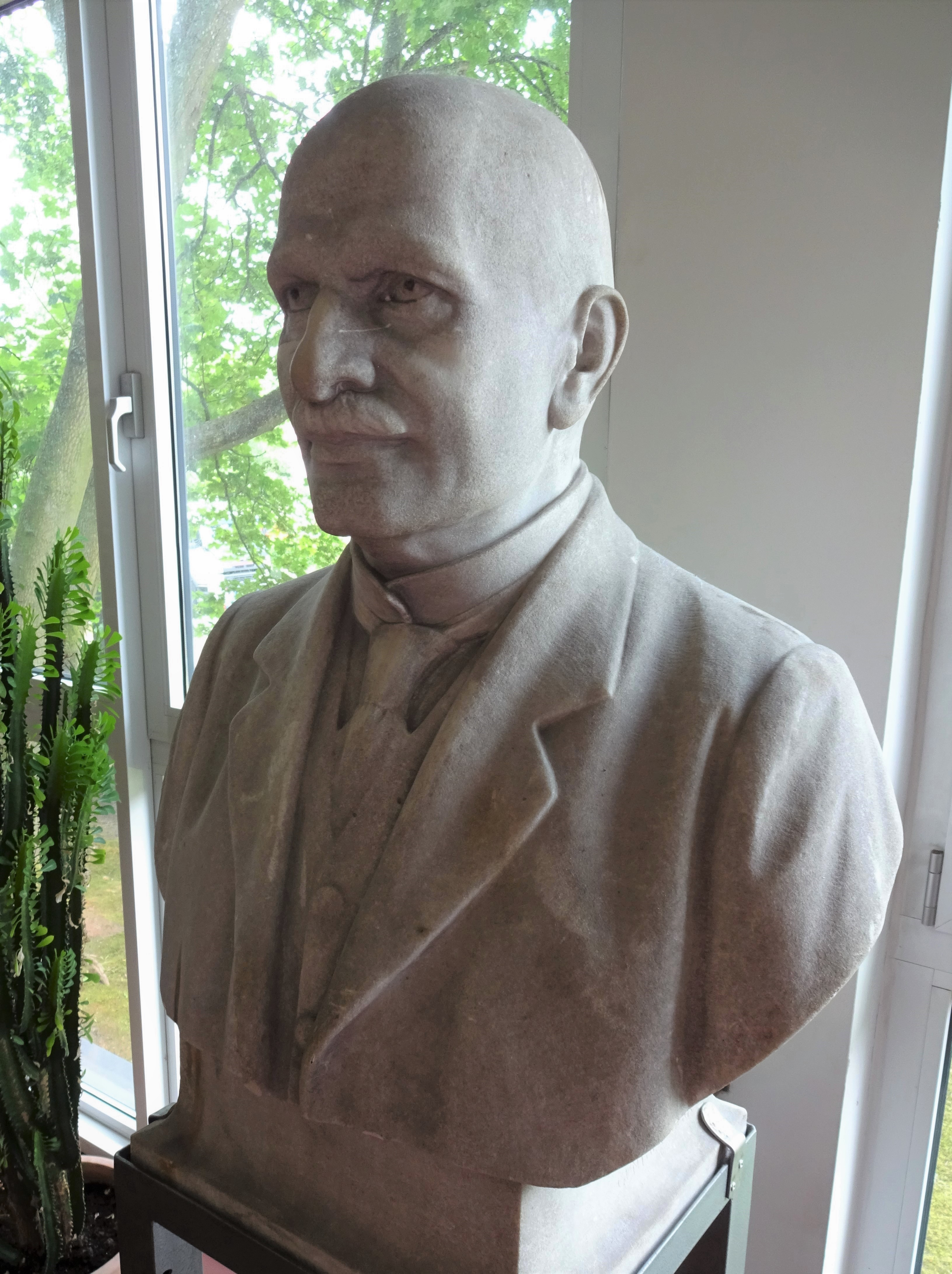 Büste Hermann Thoms von Heinrich Günther-Gera in der Freien Universität Berlin, Institut für Pharmazie, Königin-Luise-Str. 2